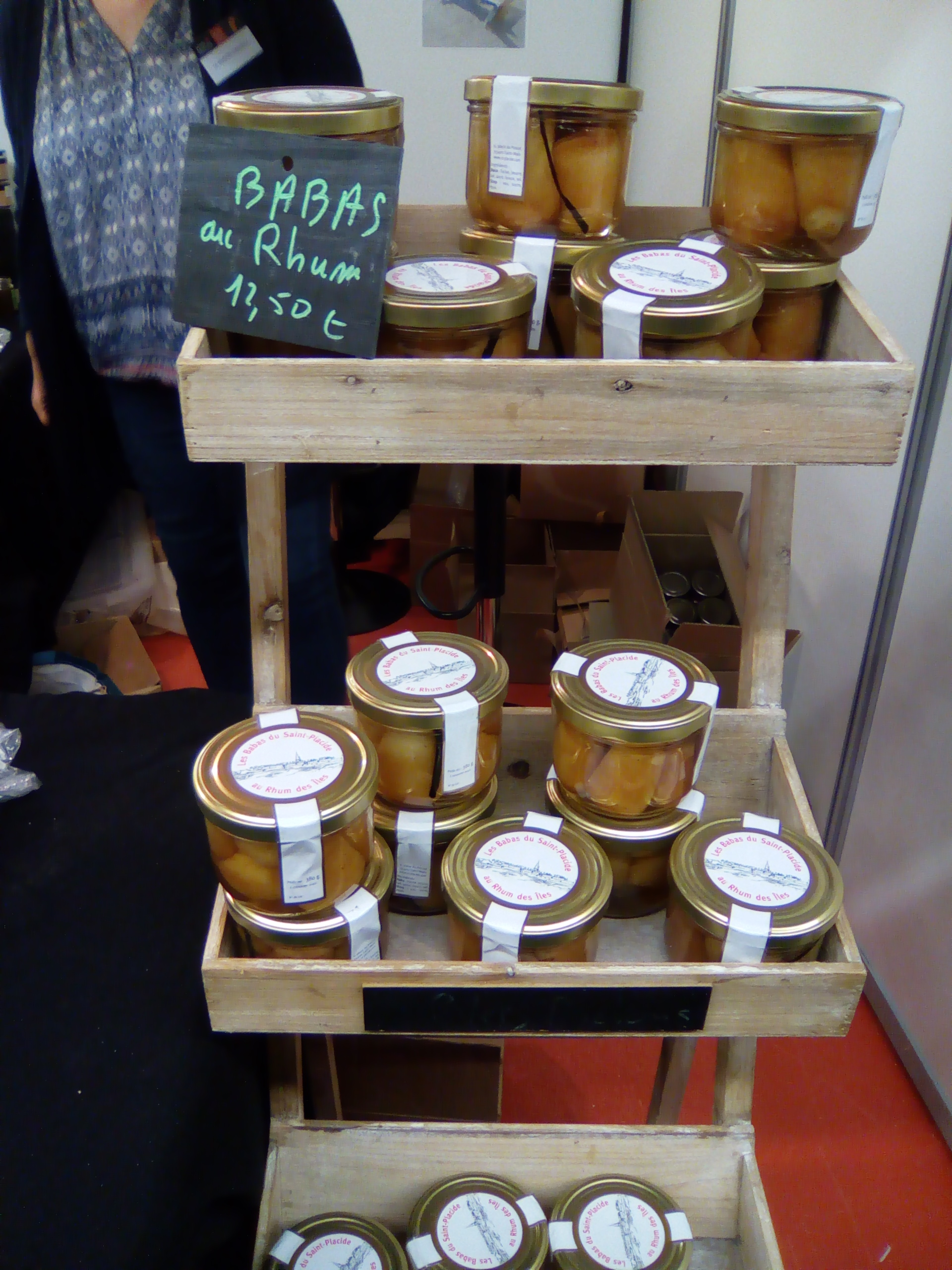 Salon Saveurs des Plaisirs gourmands.